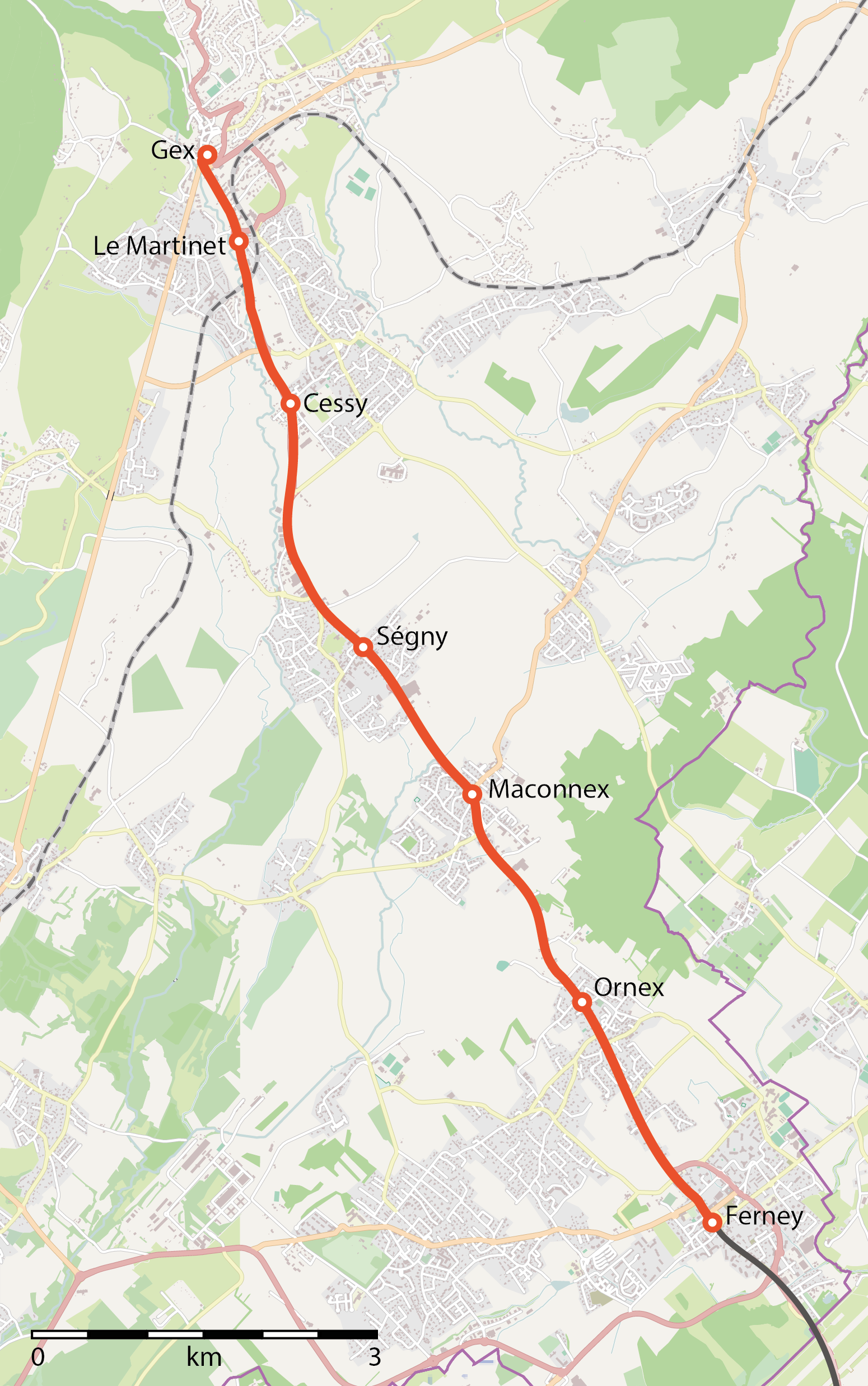 Streckenkarte der Straßenbahn Gex-Ferney.